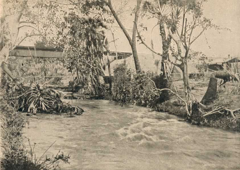 Ugandabahn: Eisenbahnbrücke über den Islanfluß